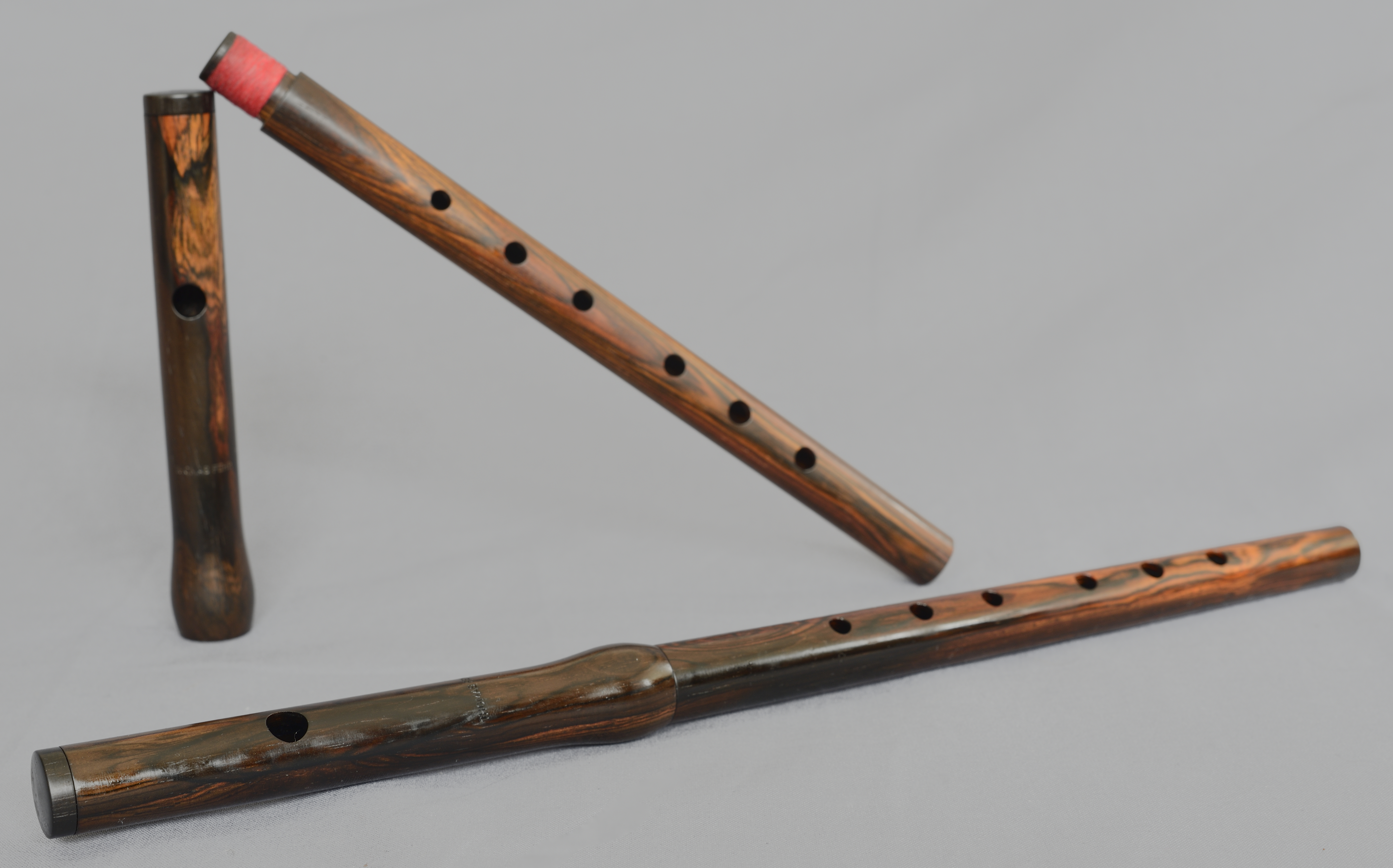 Schweizerpfeife Sopran zweiteilig